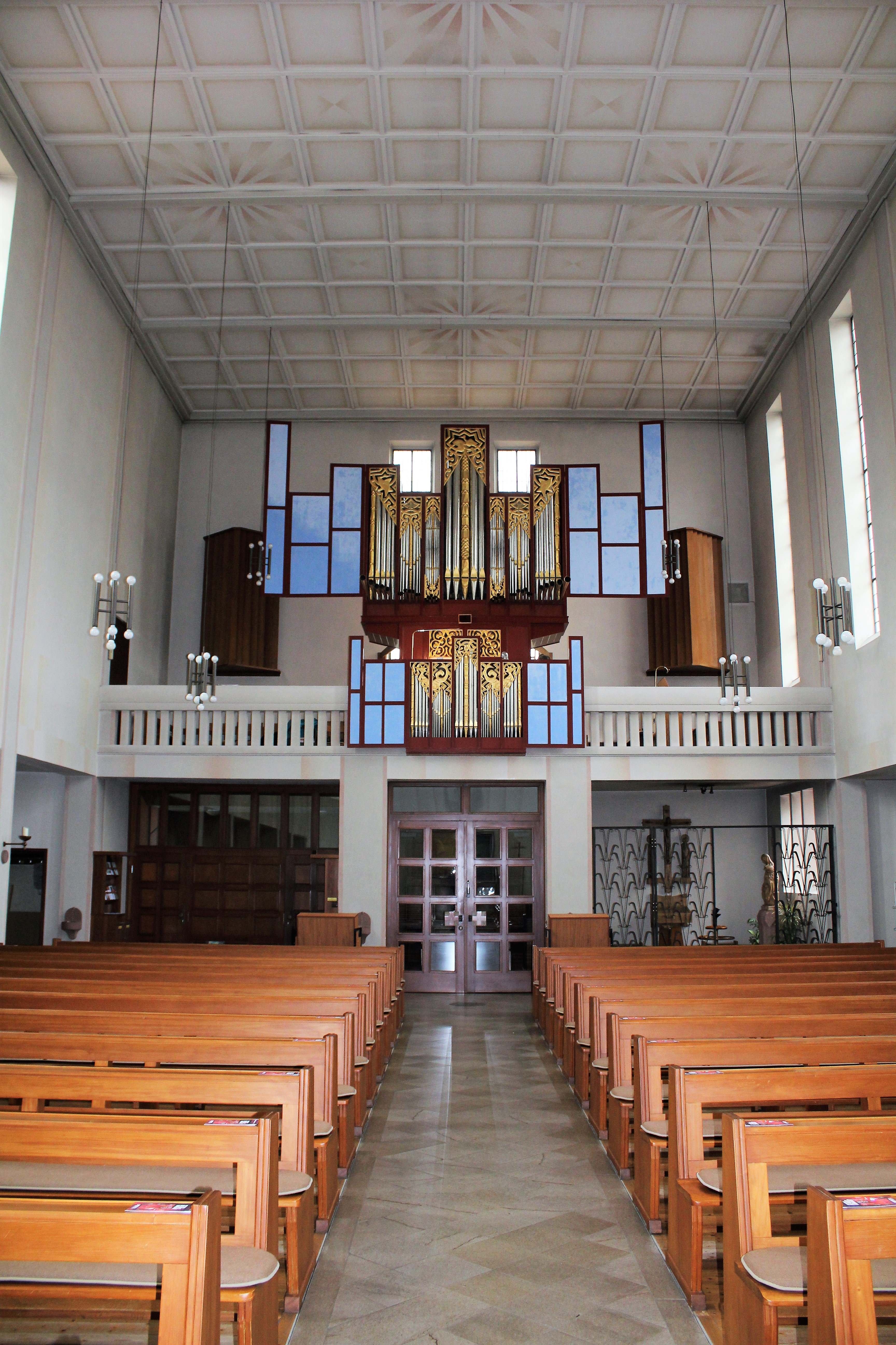 St. Marien, Leer-Loga, Ostfriesland, Deutschland